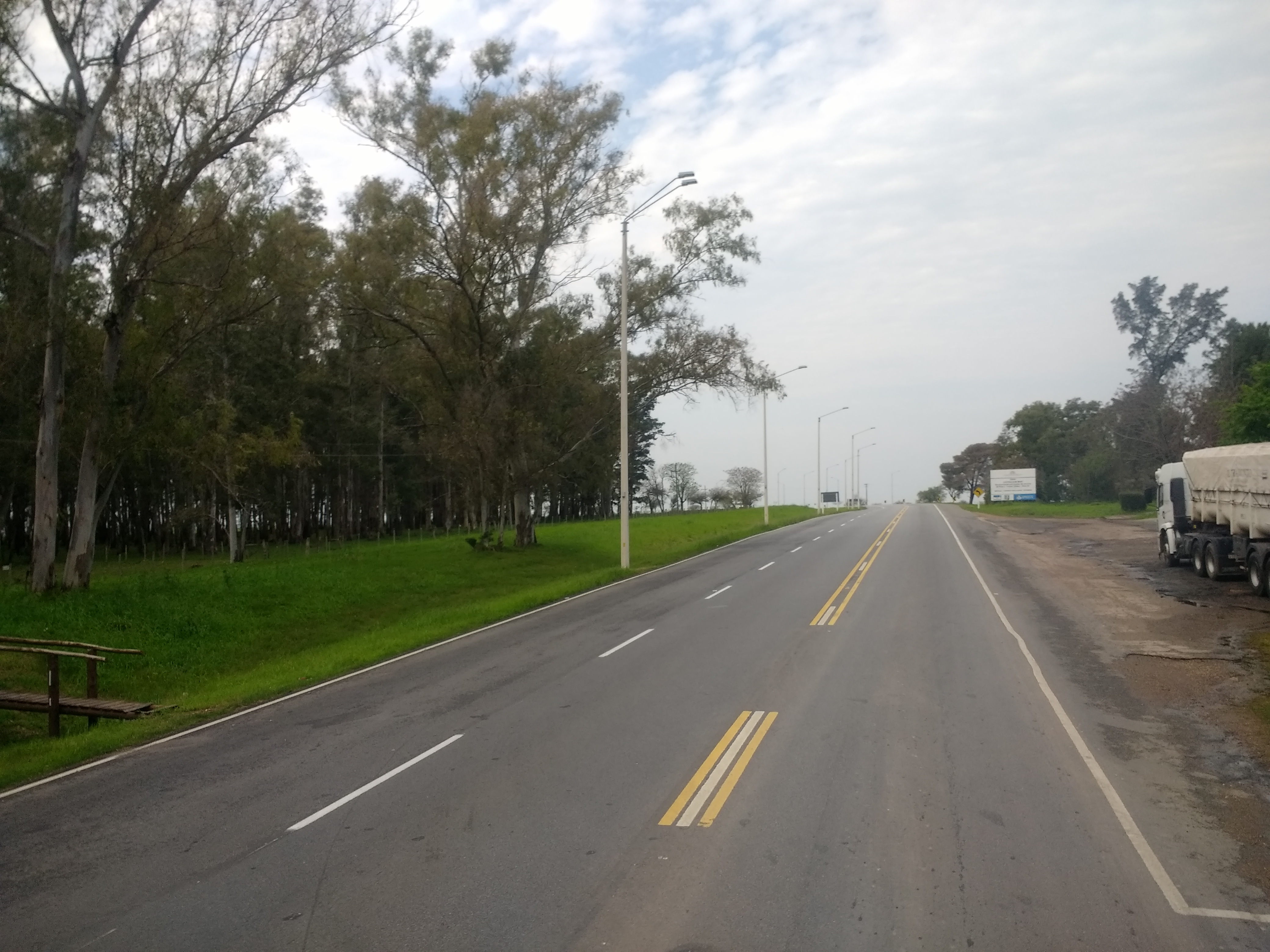 La ruta 3, cerca de donde se encuentra con la ruta 24 en el Departamento de Paysandú.